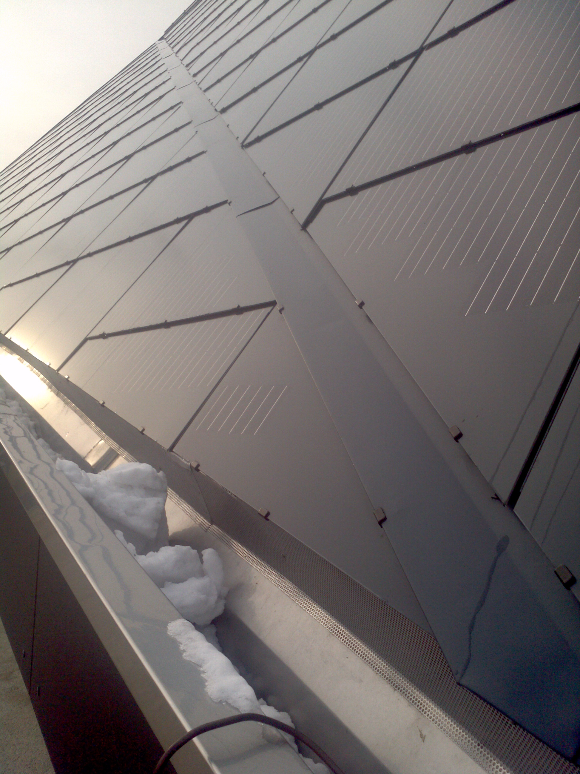 umweltarena, Spreitenbach, Solarverkleidung